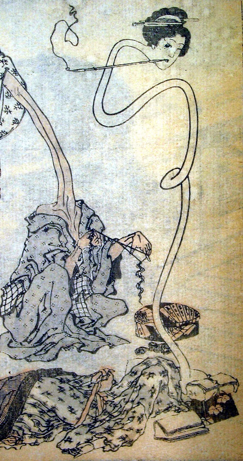 a pair of Wikipedia:Rokurokubi, drawn by Hokusai